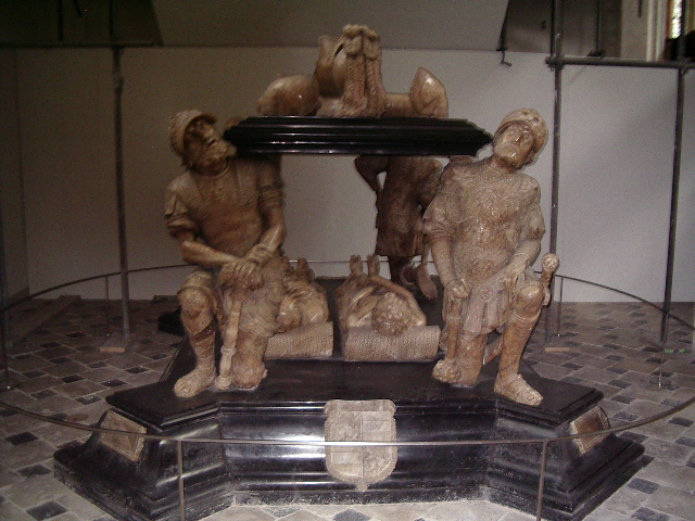 Foto van het praalgraf van Graaf Engelbrecht II van Breda in de Grote Kerk van Breda. Foto gemaakt door Jeroen Soree.